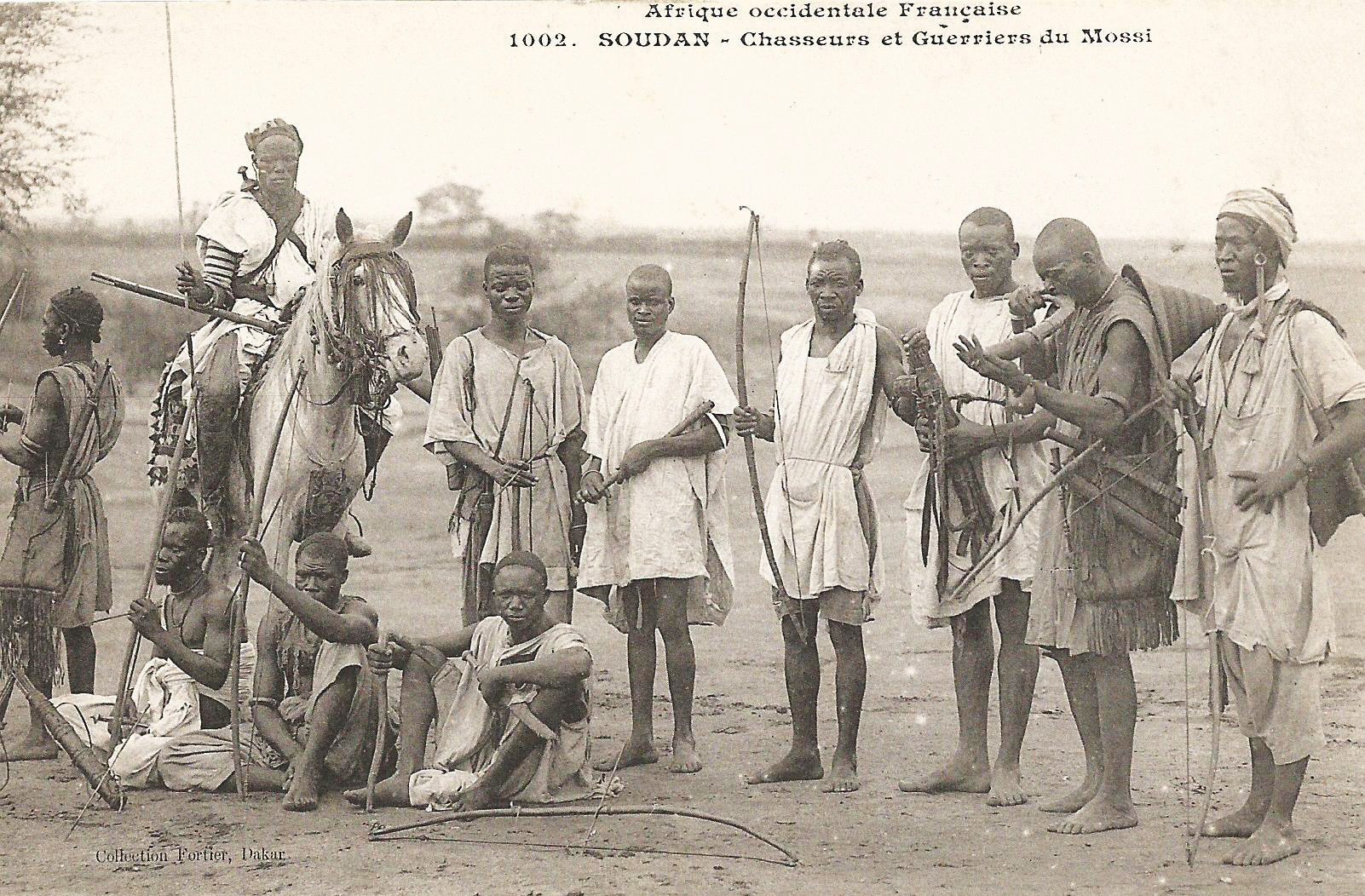 François-Edmond Fortier, Chasseurs et guerriers du Mossi. Afrique Occidentale - Soudan.